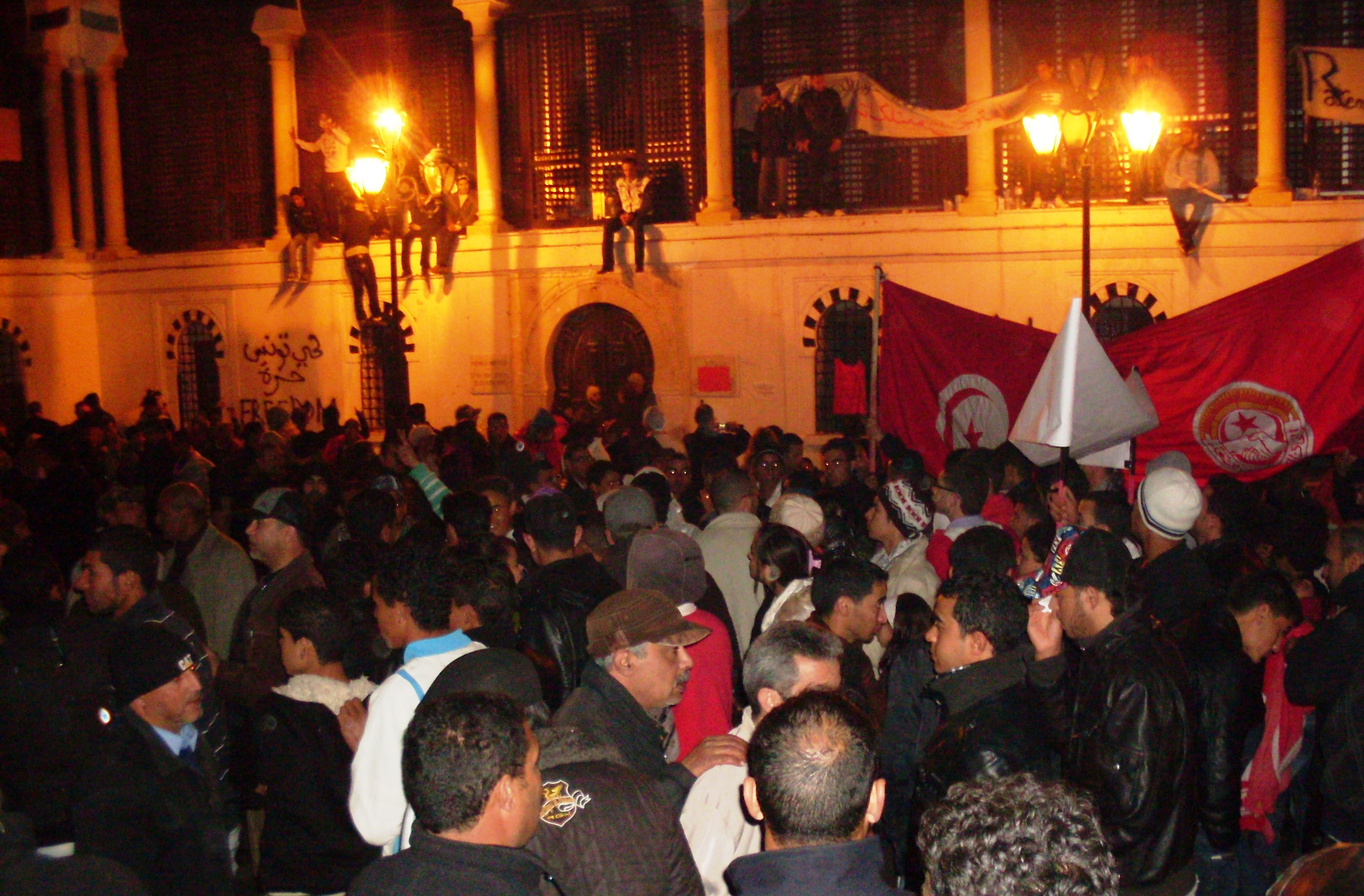 Manifestations à la place du gouvernement lors de la Caravane de la libération suite à la révolution des Jasmins